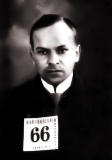 Spalernajan vanki Oskar Pirinen